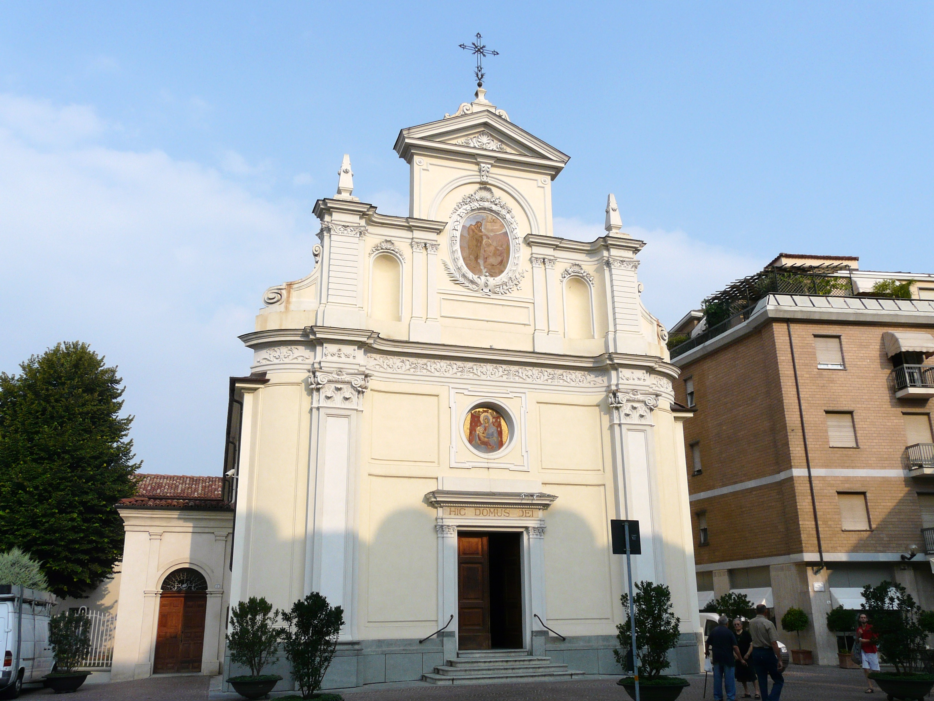 Chiesa di San Giovanni Battista, Alba, Piemonte, Italia